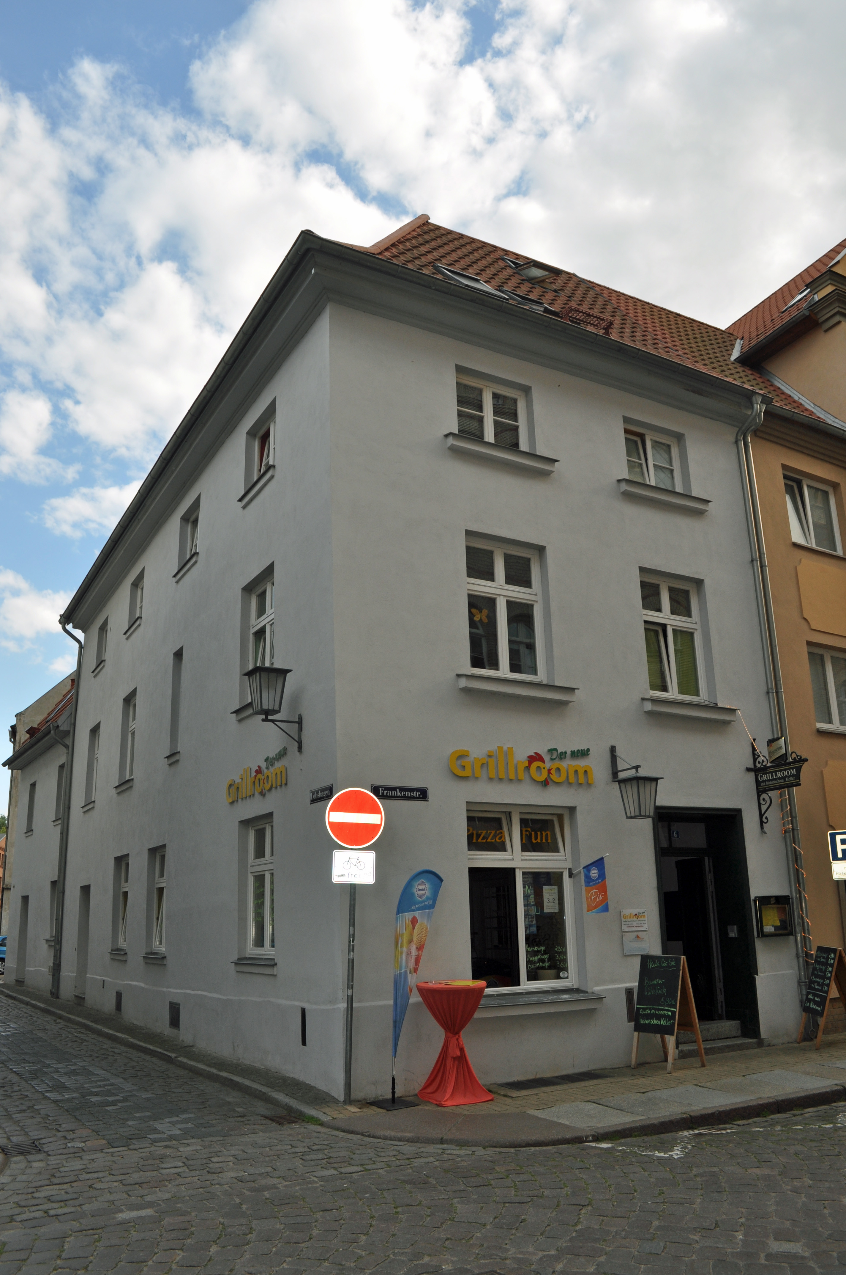 Das Foto zeigt ein Haus (bzw. Details des Hauses) in der Frankenstraße in Stralsund, Deutschland. Die Hausnummer steht im Dateinamen. Aufgenommen am 19. Juli 2011 vom Benutzer:Klugschnacker.